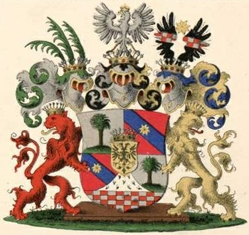 Keyserlingki suguvõsa krahvivapp (Püha Rooma keisririik)